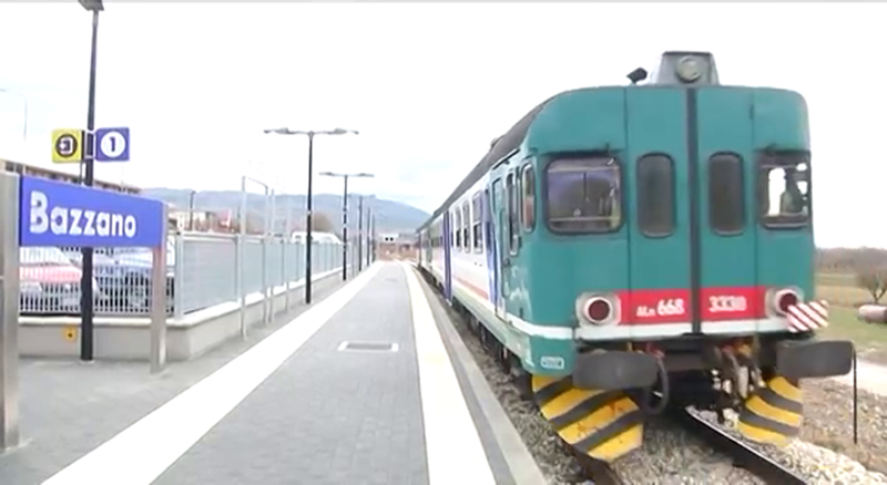 Cerimonia di inaugurazione delle due fermate ferroviarie di "Bazzano" e "L'Aquila Campo di Pile" - L'Aquila, 11 dicembre 2017